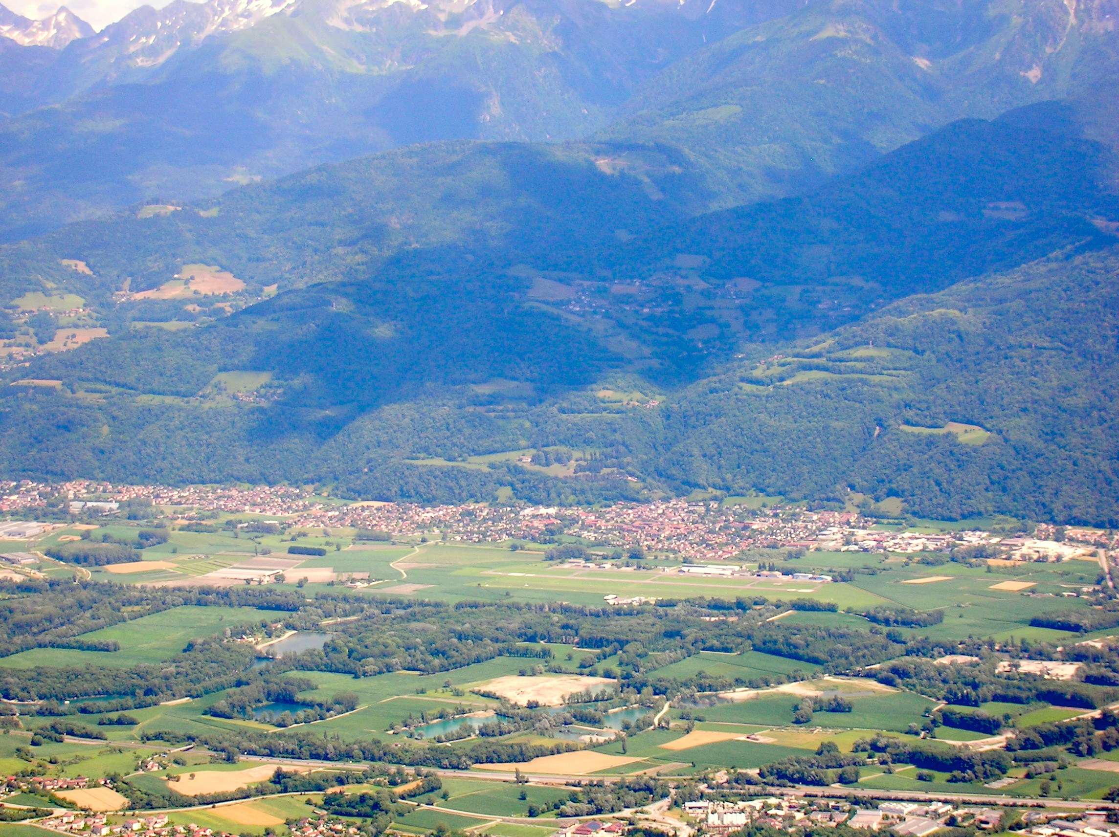 Vue générale de l'agglomeration grenoblois depuis le Fort St Eynard, Le Sappey-en-Chartreuse, Isère, France. Le Versoud, Aérodrome de Grenoble-Le Versoud, Saint-Jean-le-Vieux, Cité de Pruney et bord de Villard-Bonnot, La Combe-de-Lancey, etc. (voir notes)